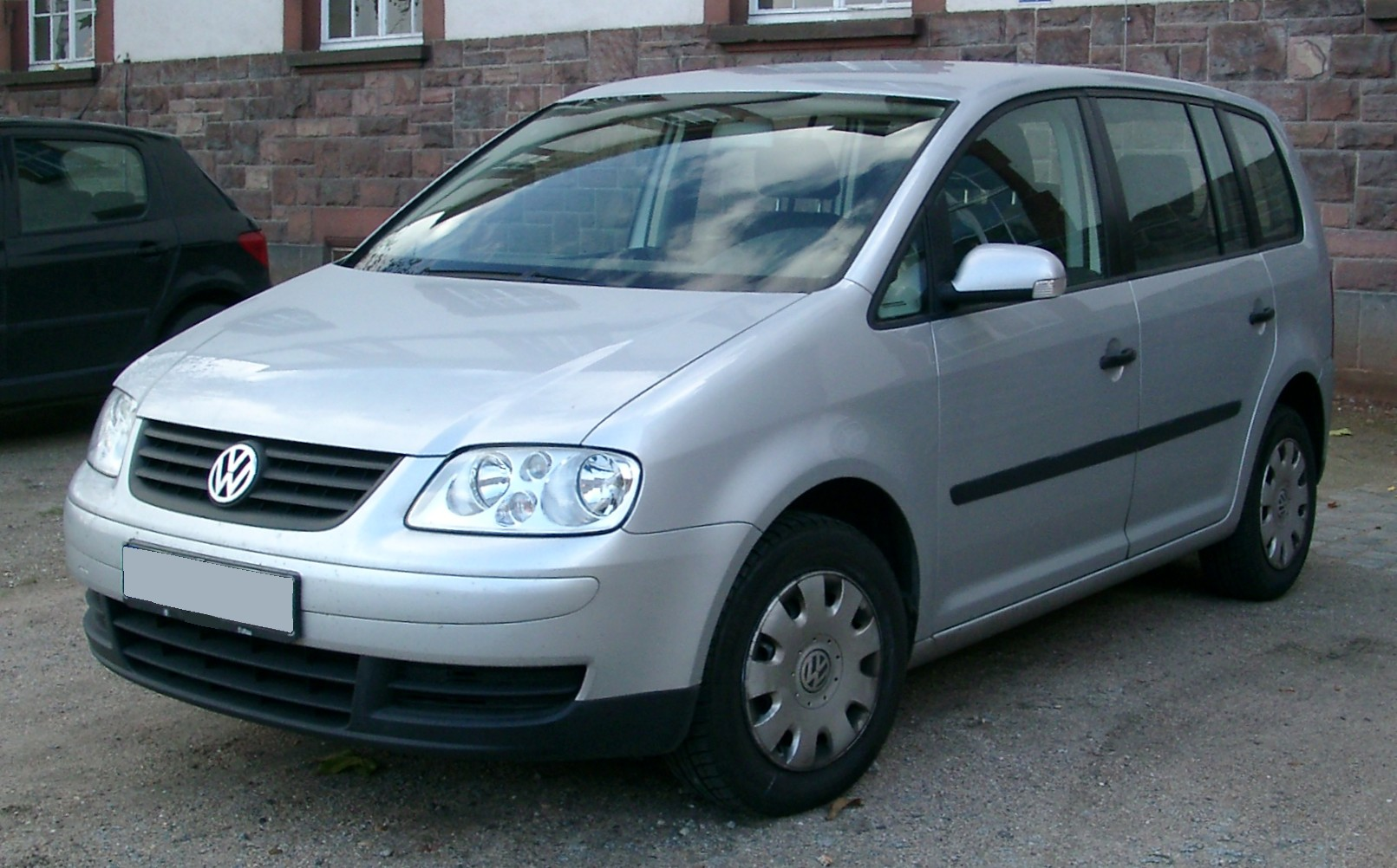 VW Touran